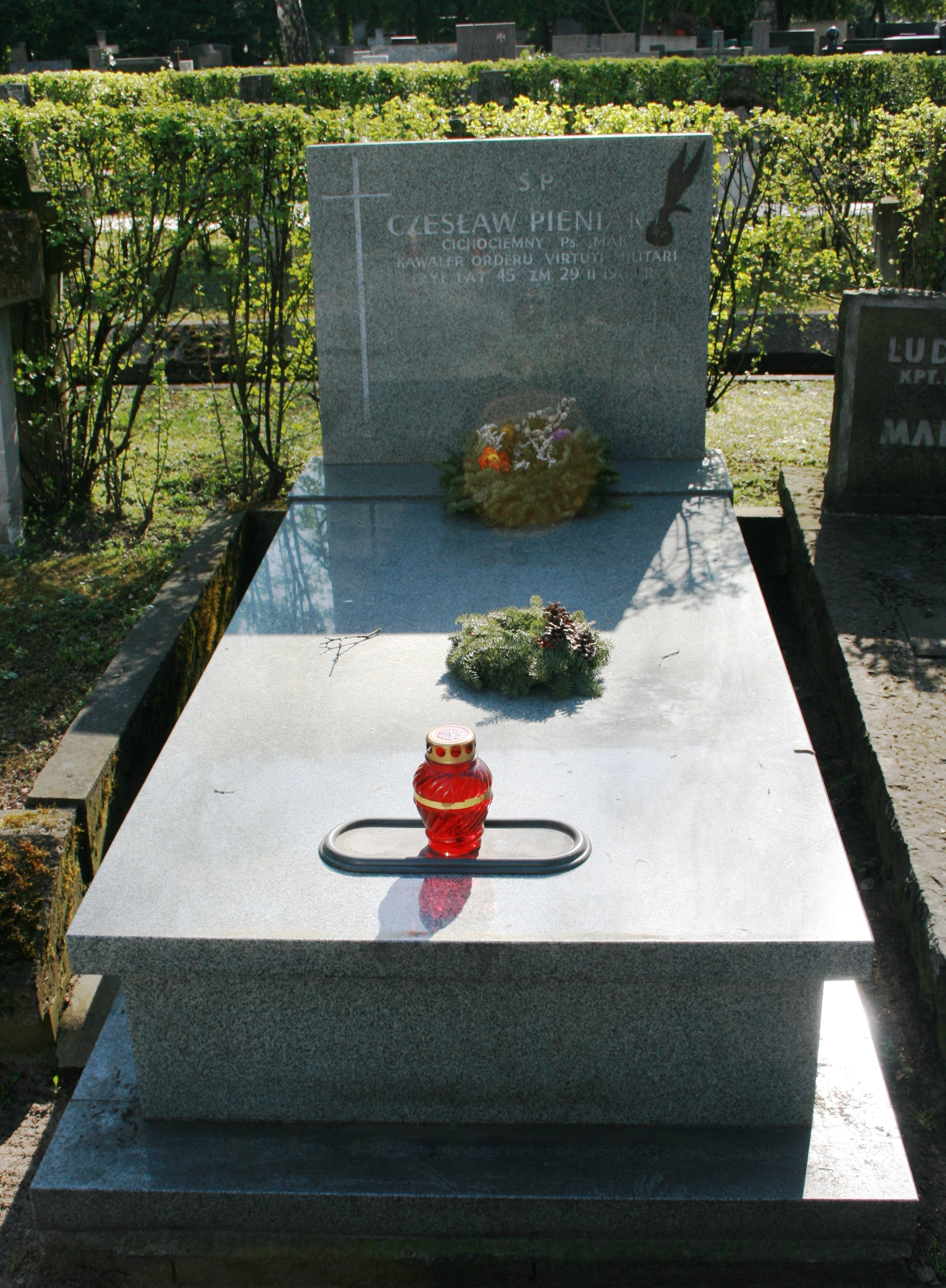 Grób na Powązkach Wojskowych w Warszawie